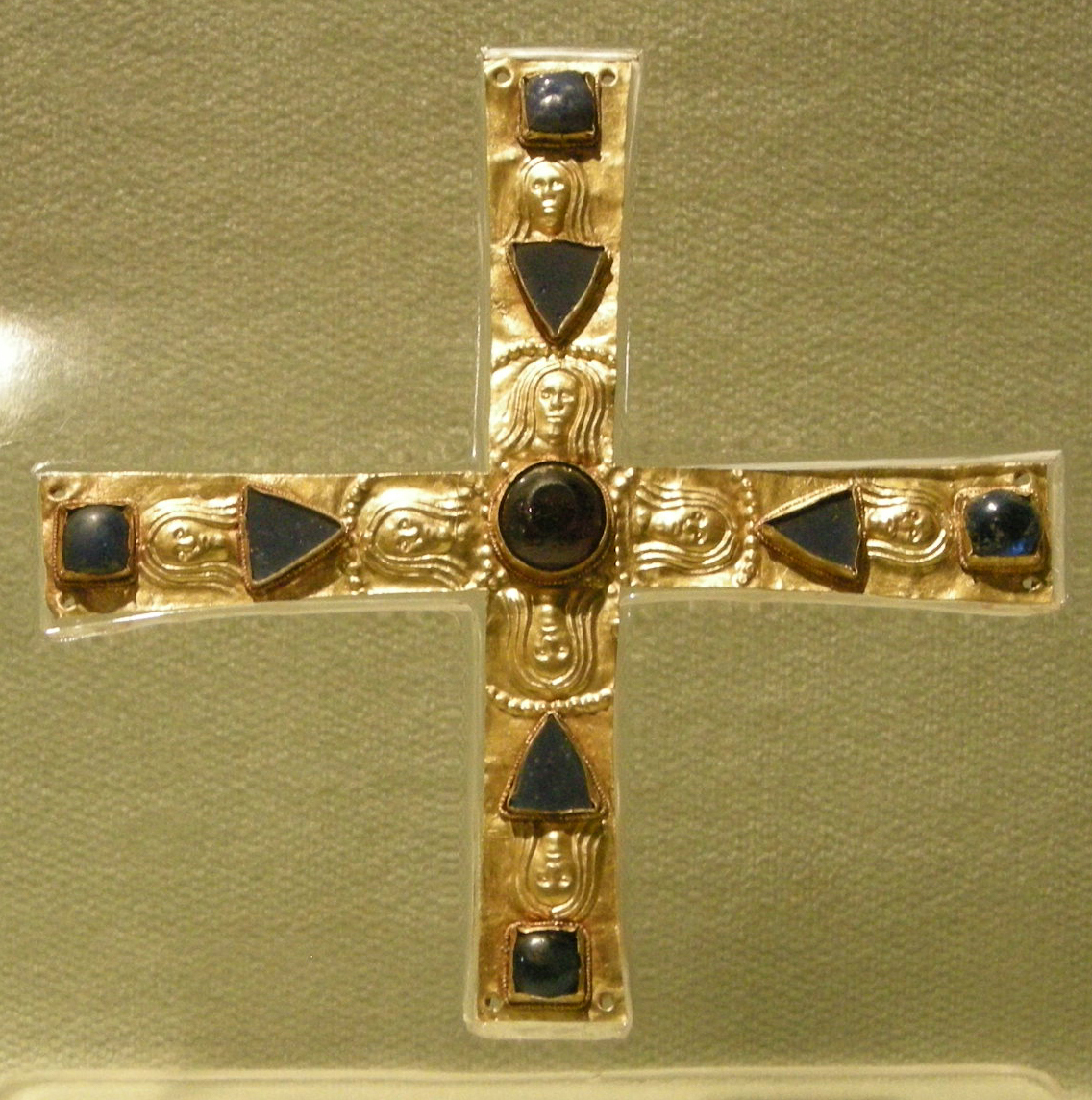 Museo Archeologico Nazionale di Cividale - MIBAC This is a photo of a monument which is part of cultural heritage of Italy.